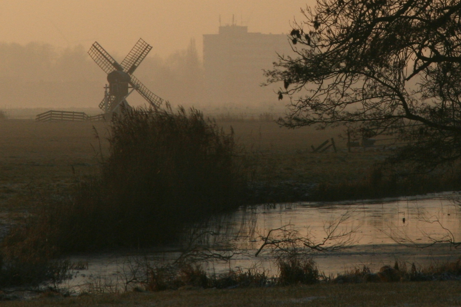 Hartwert: Oegekloostermolen - sfeerfoto